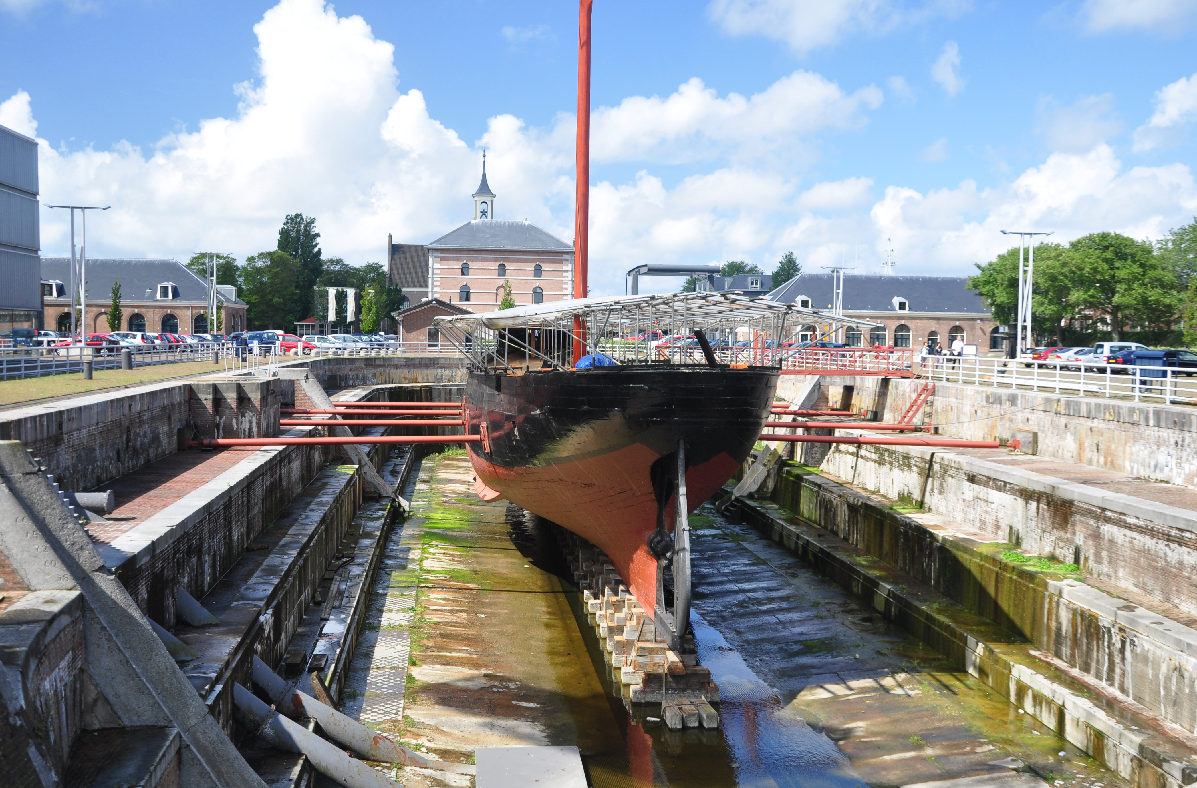 Den Helder, Historisches Trockendoch